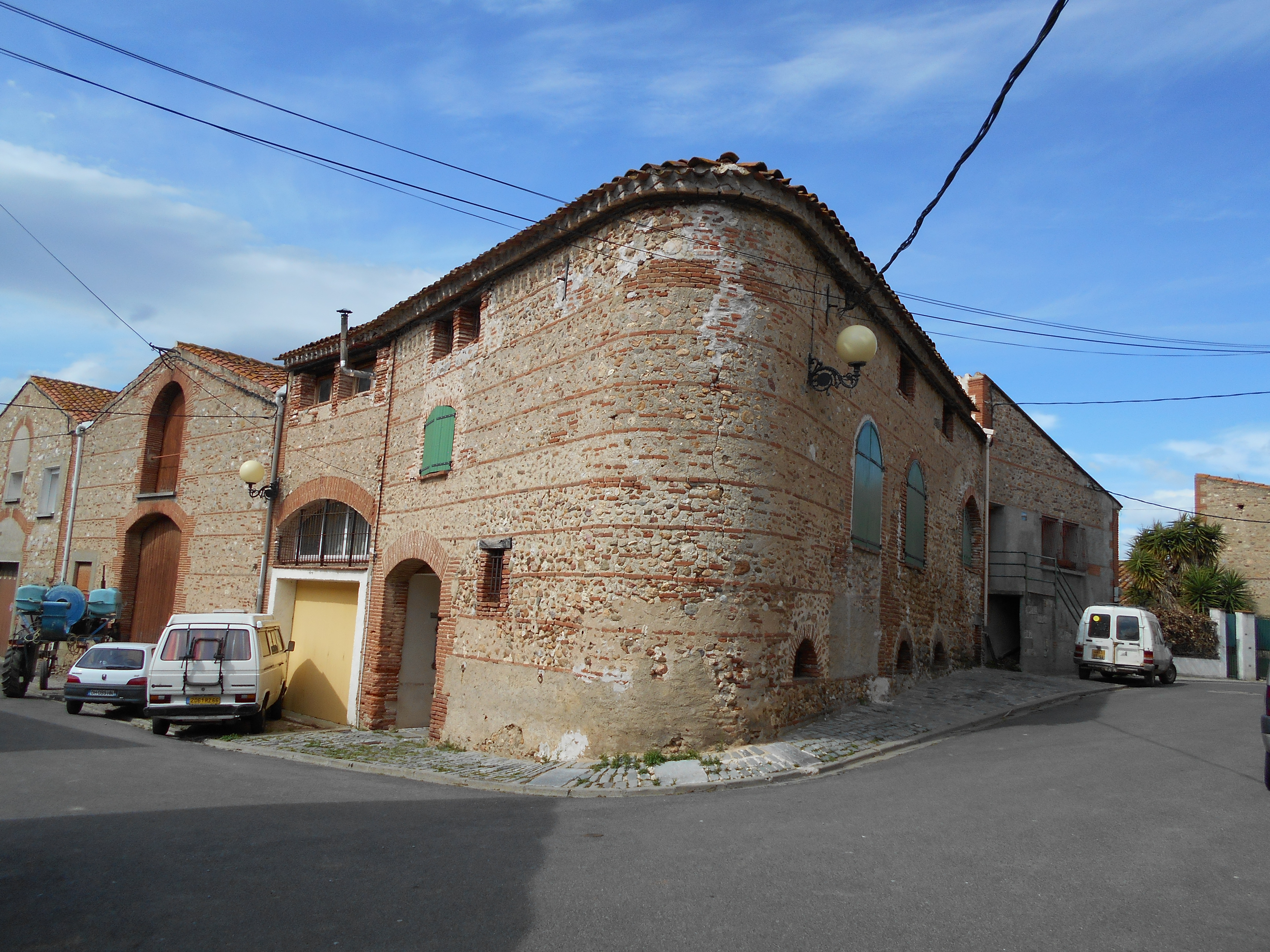 Cases de la cellera de Nyils 1